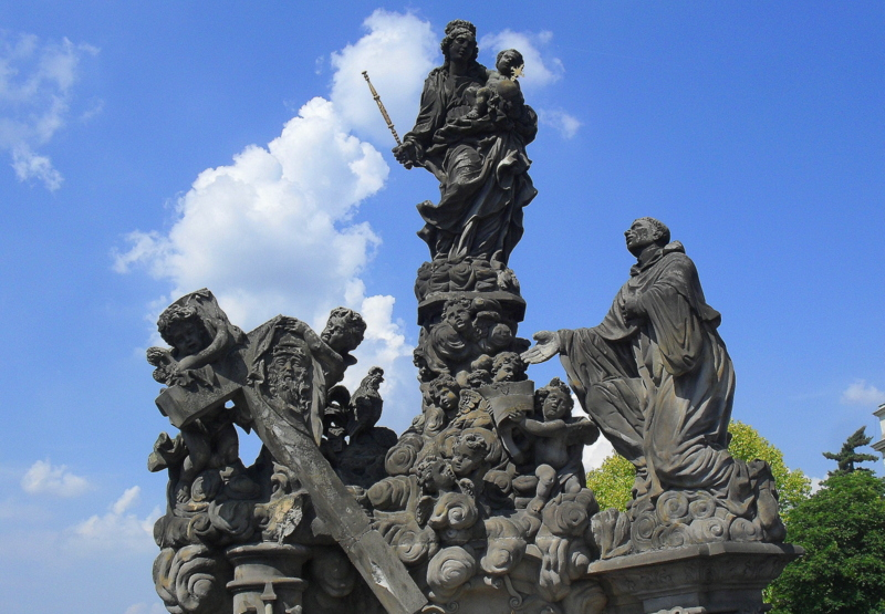 Karlův most, Staré Město a Malá Strana, mezi Křižovnickým náměstím a Mosteckou